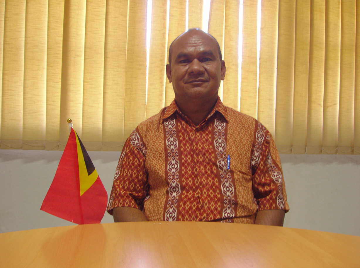 Sidonio Fontes, Administrator des Subdistrikts Atabae